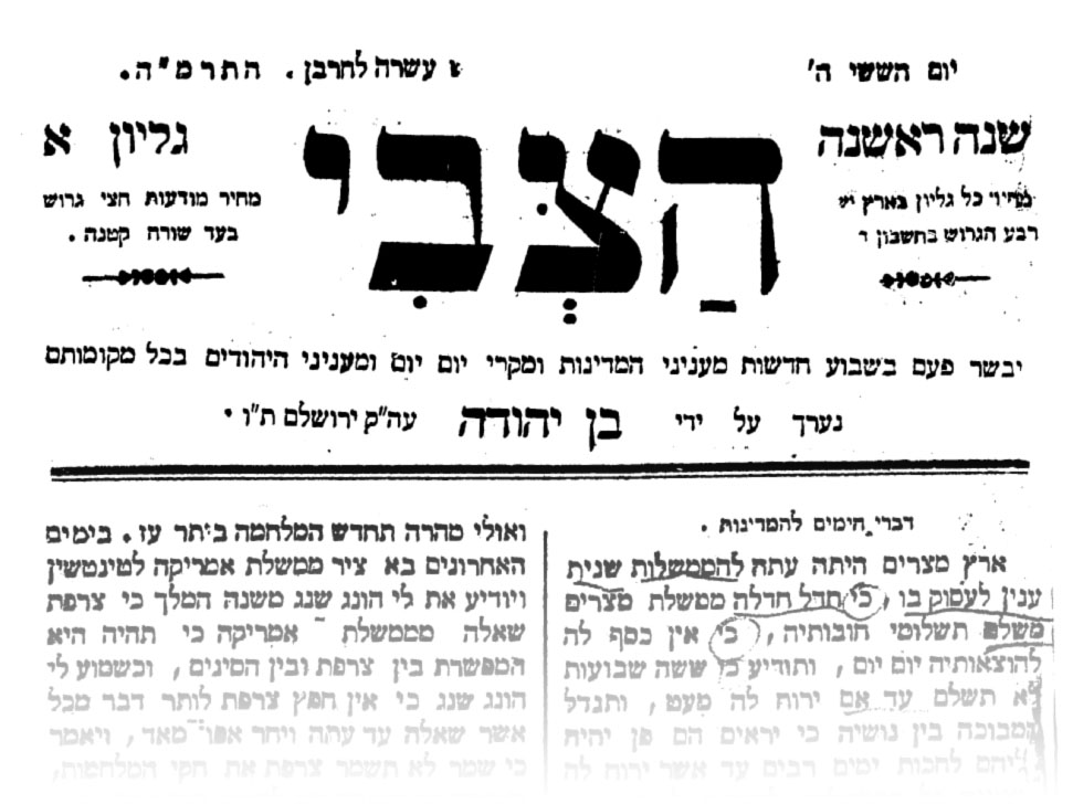 שער עיתון הצבי